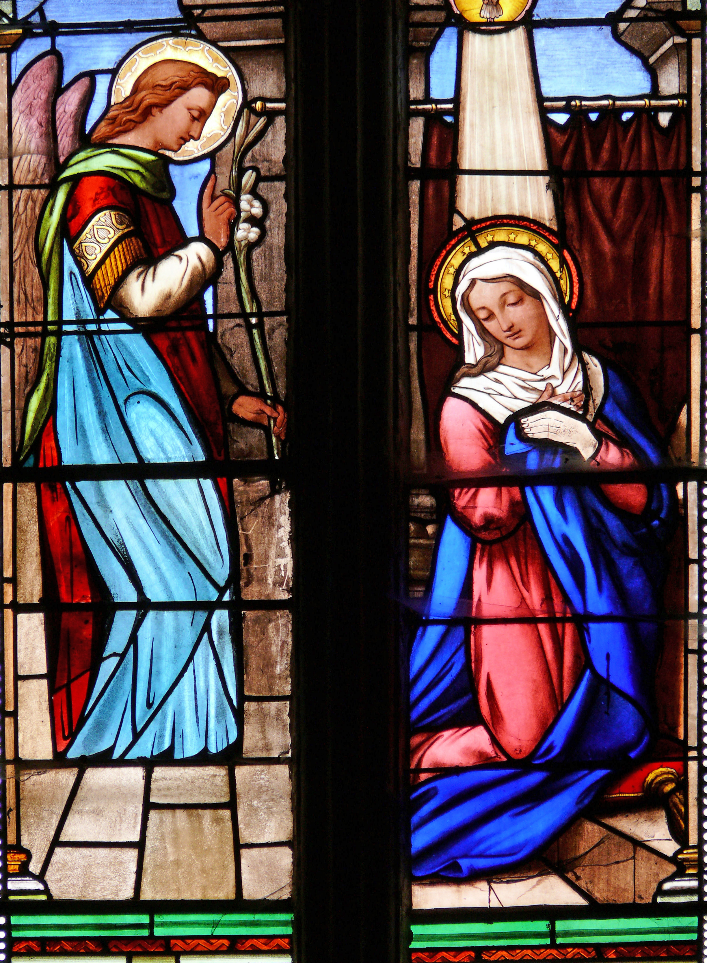 Assier - Église Saint-Pierre - Vitrail du XIXe siècle : Annonciation